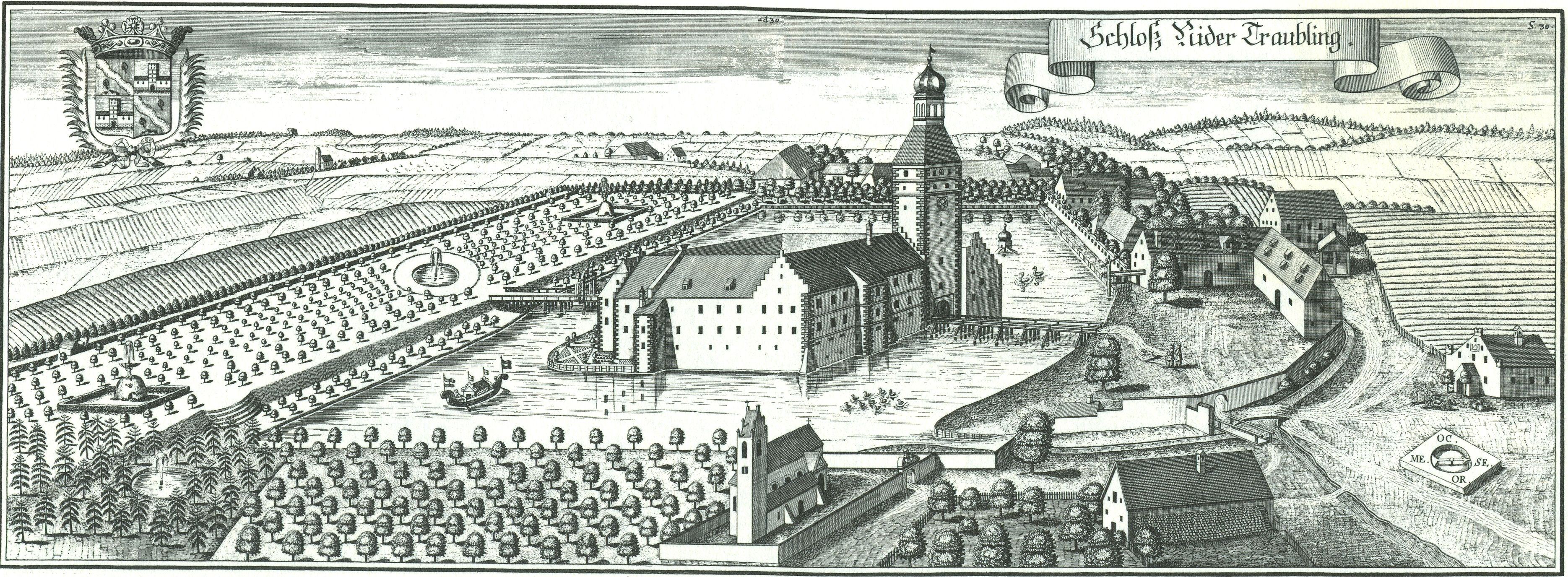 Schloss Niedertraubling nach einem Stich von Michael Wening (1720)